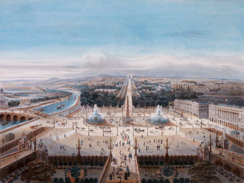 Paris, Place de la Concorde. Farblithographie, Anfang 19. Jh. Bildgröße 39 x 52,5 cm